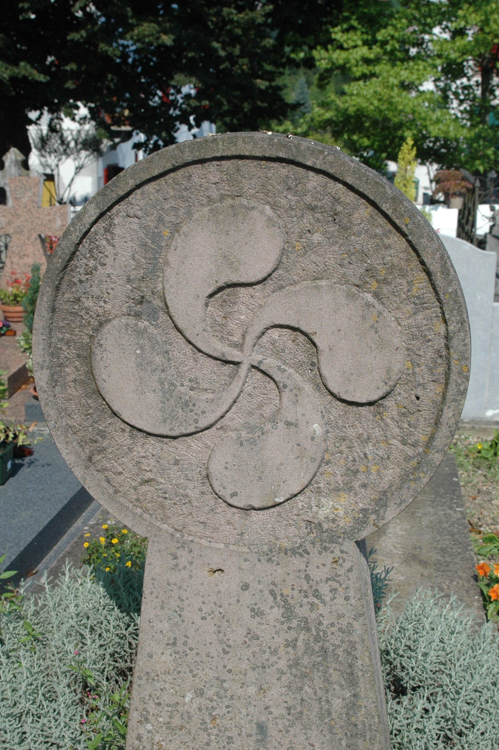 Ainhoa, stèle discoïdale, prise le 08/07/06 par Harrieta171